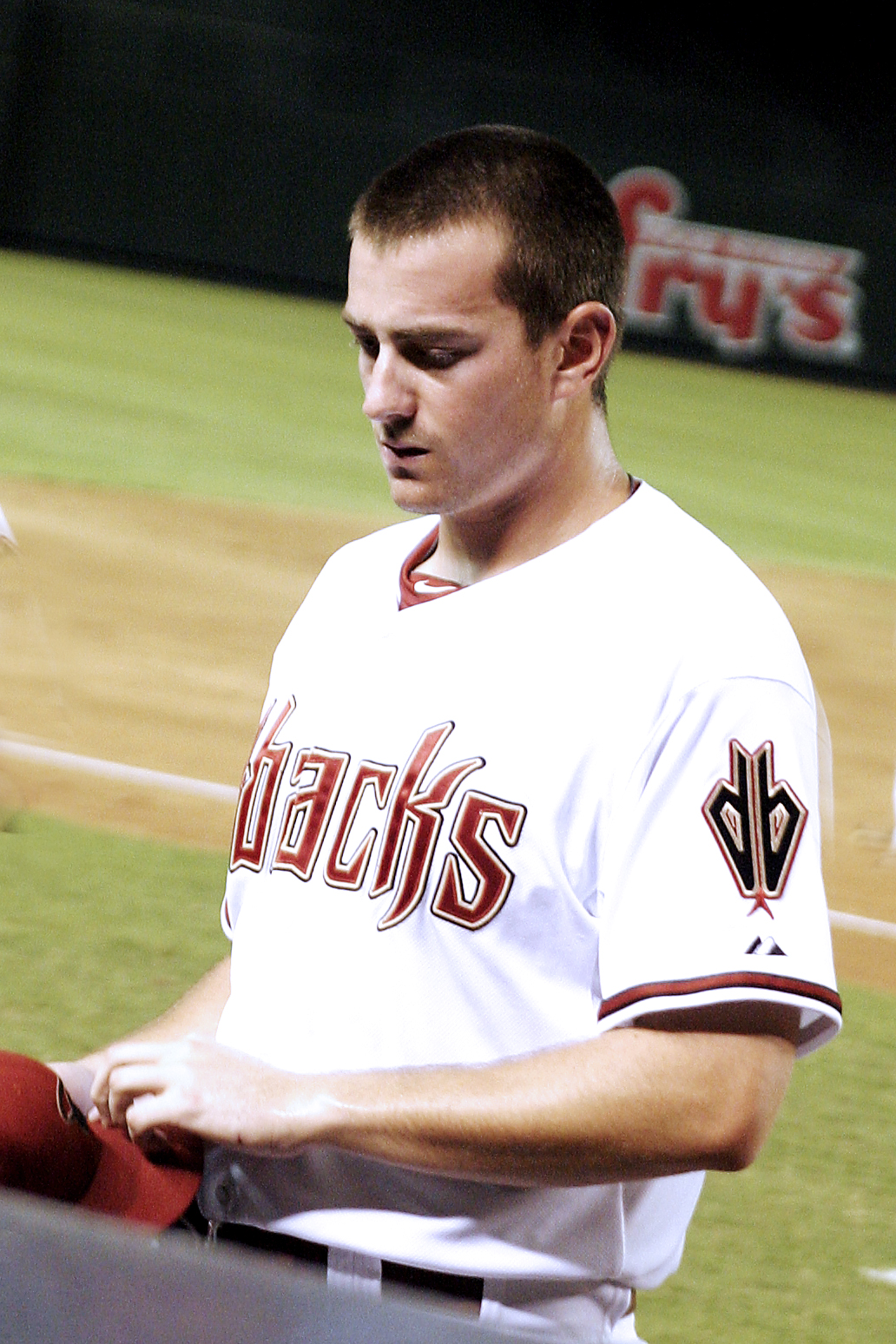 05:41, 24 September 2010 . . Mwinog2777 . . 1,032×1,548 (1.21 MB)